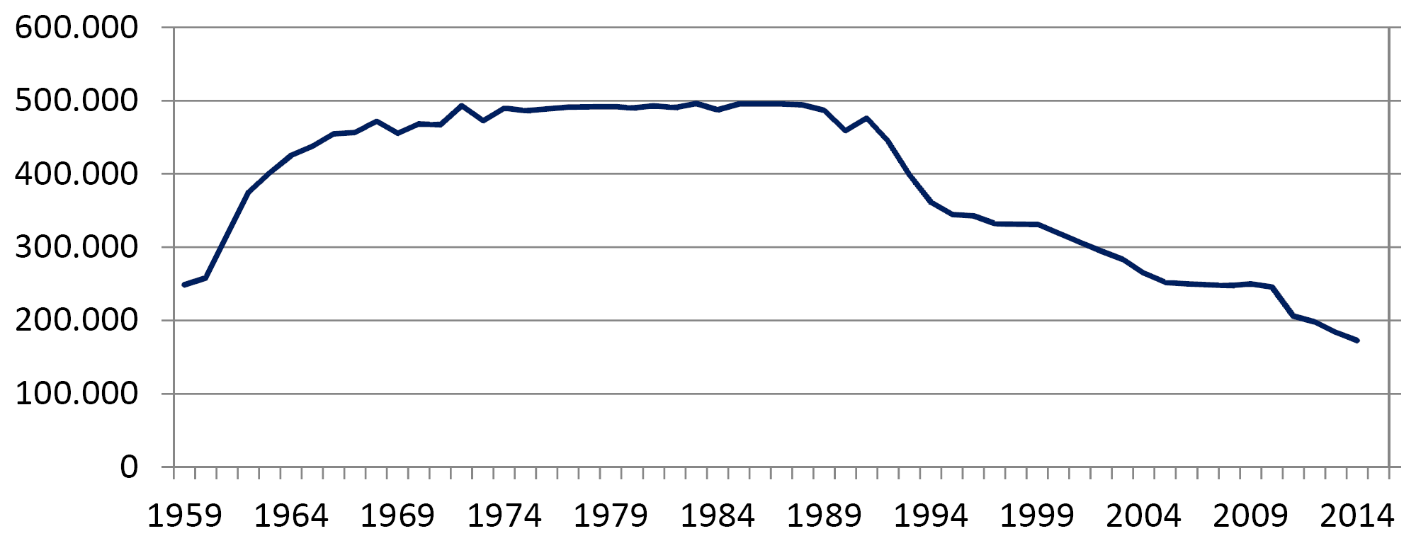 Jahresdurchschnittswerte der Soldaten bei der Bundeswehr von 1959-2010. Entnommen aus dem 52.Wehrbericht des Wehrbeauftragten des Deutschen Bundestags vom 25.01.2011, S.56.